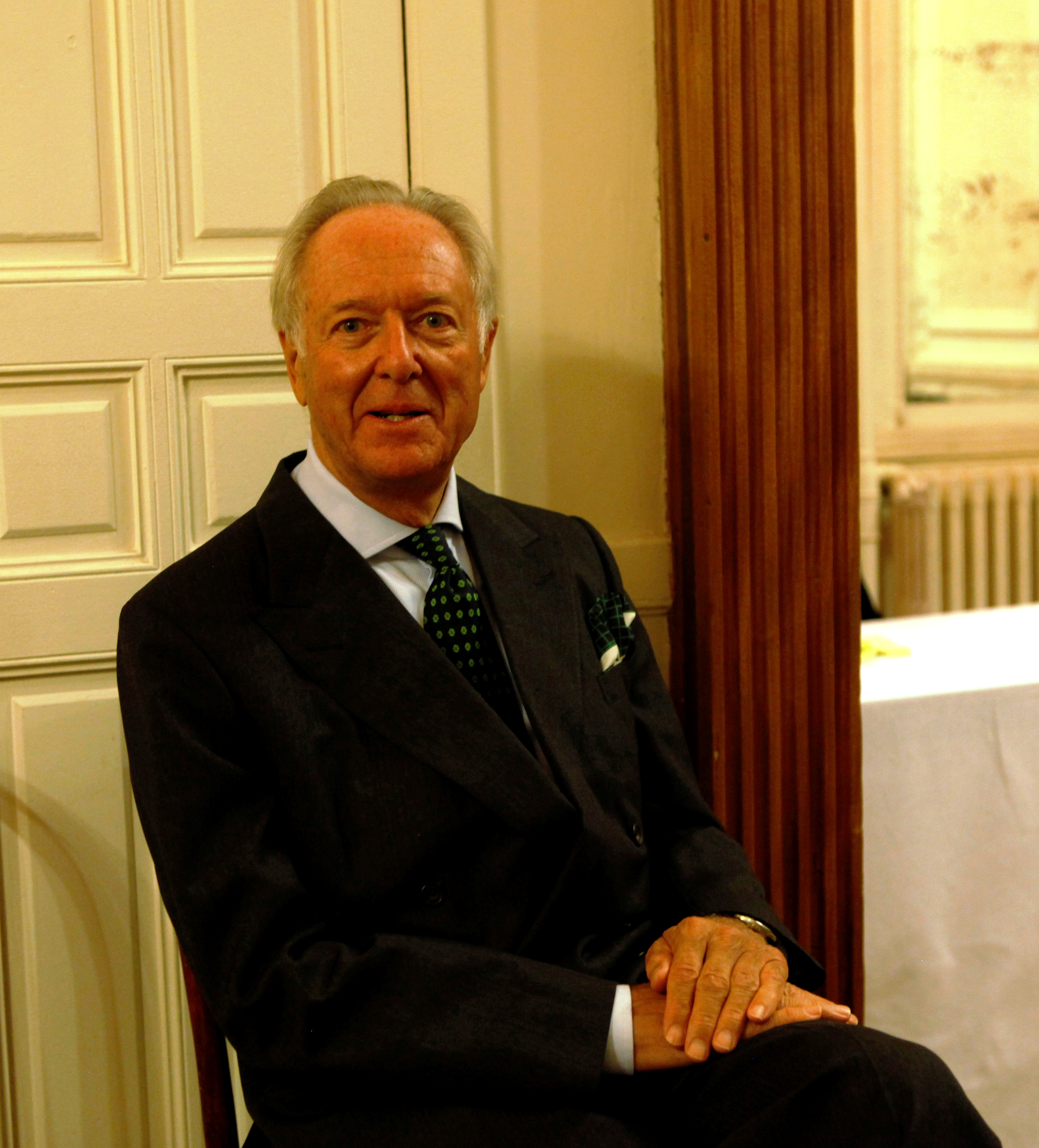 Никита Дмитриевич Лобанов-Ростовский